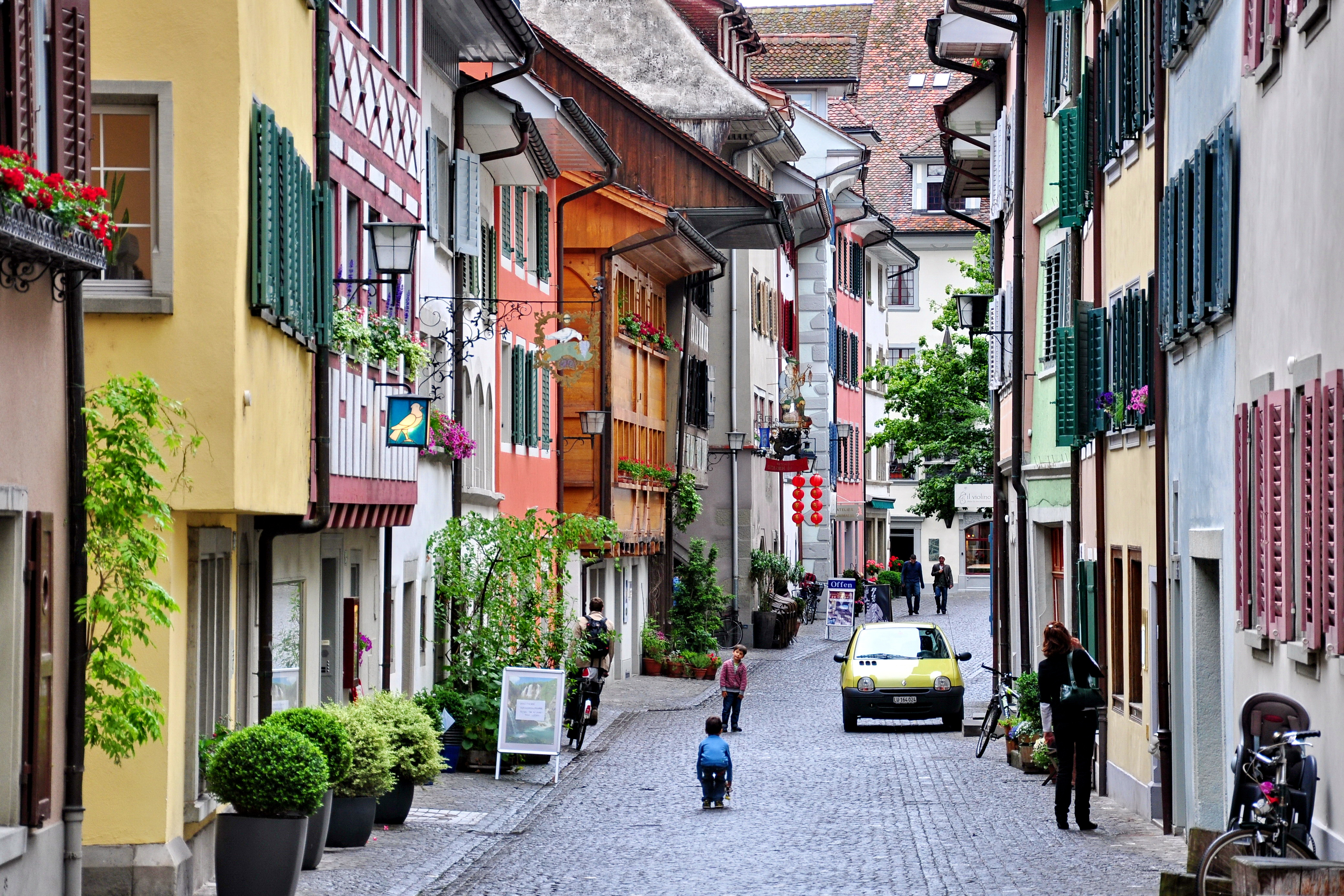 Unterstadt in Zug (Switzerland)